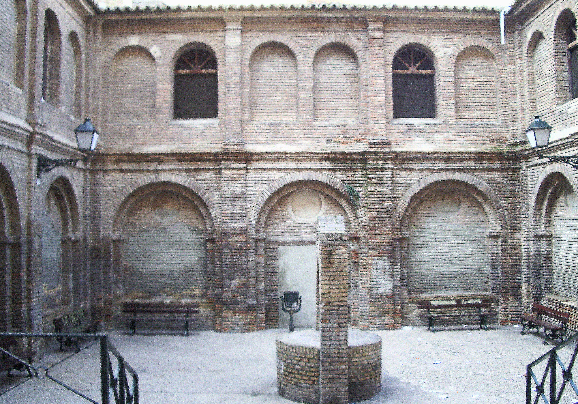 Claustro del monasterio de las Fecetas (Zaragoza, España)